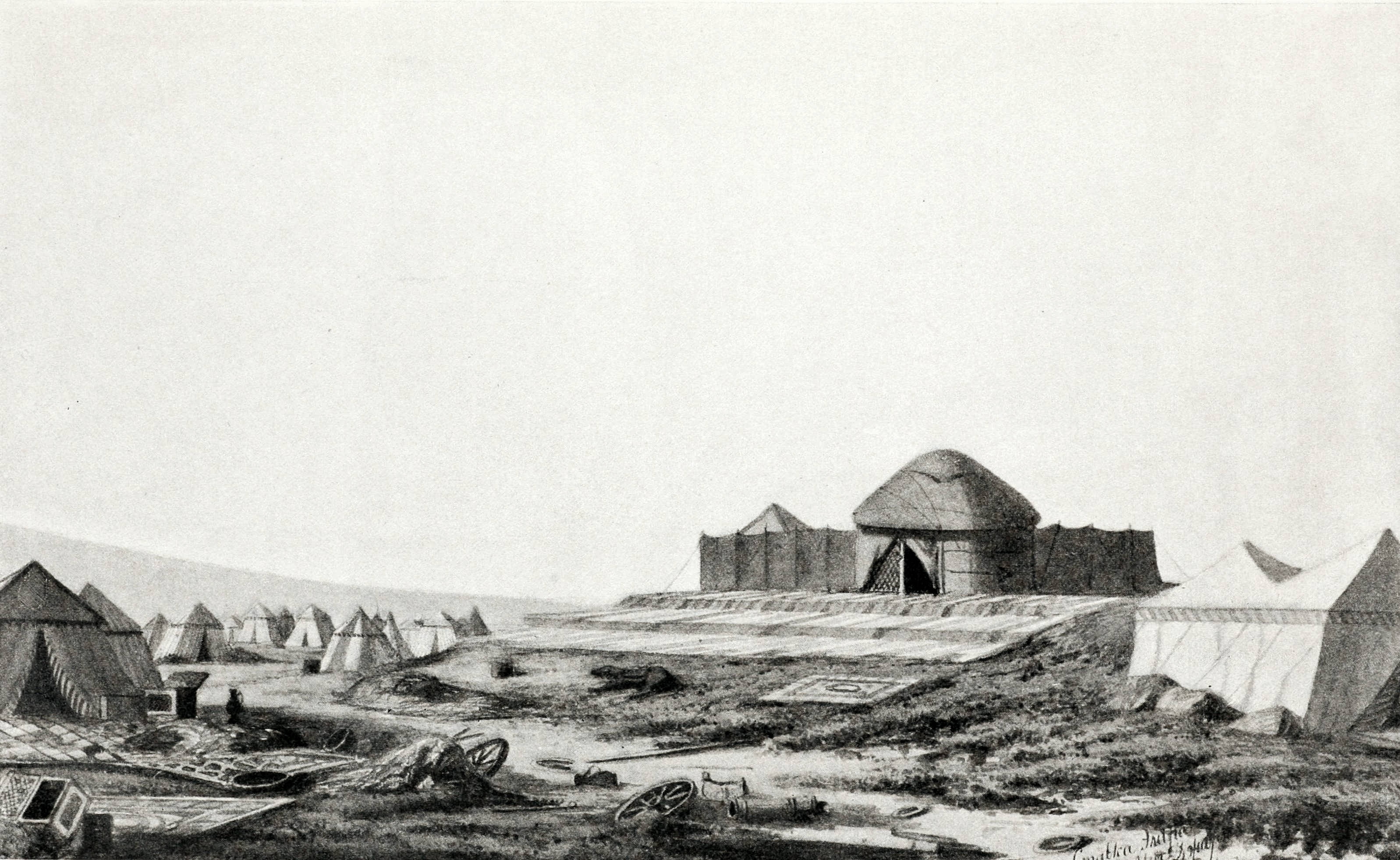 Ставка эмира Бухарского у Ирджара. (С акварели генерал-майора Романовского). Это изображение было использовано для иллюстрирования статьи «Ирджар» опубликованной в одиннадцатом томе «Военной энциклопедии», который был издан книгоиздательским товариществом И. Д. Сытина в 1913 году в столице Российской империи городе Санкт-Петербурге.